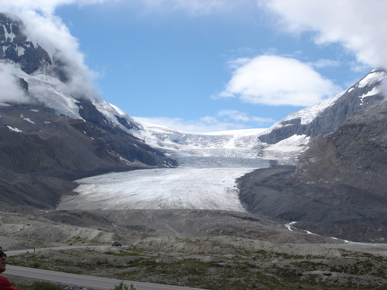 Columbia Icefields.